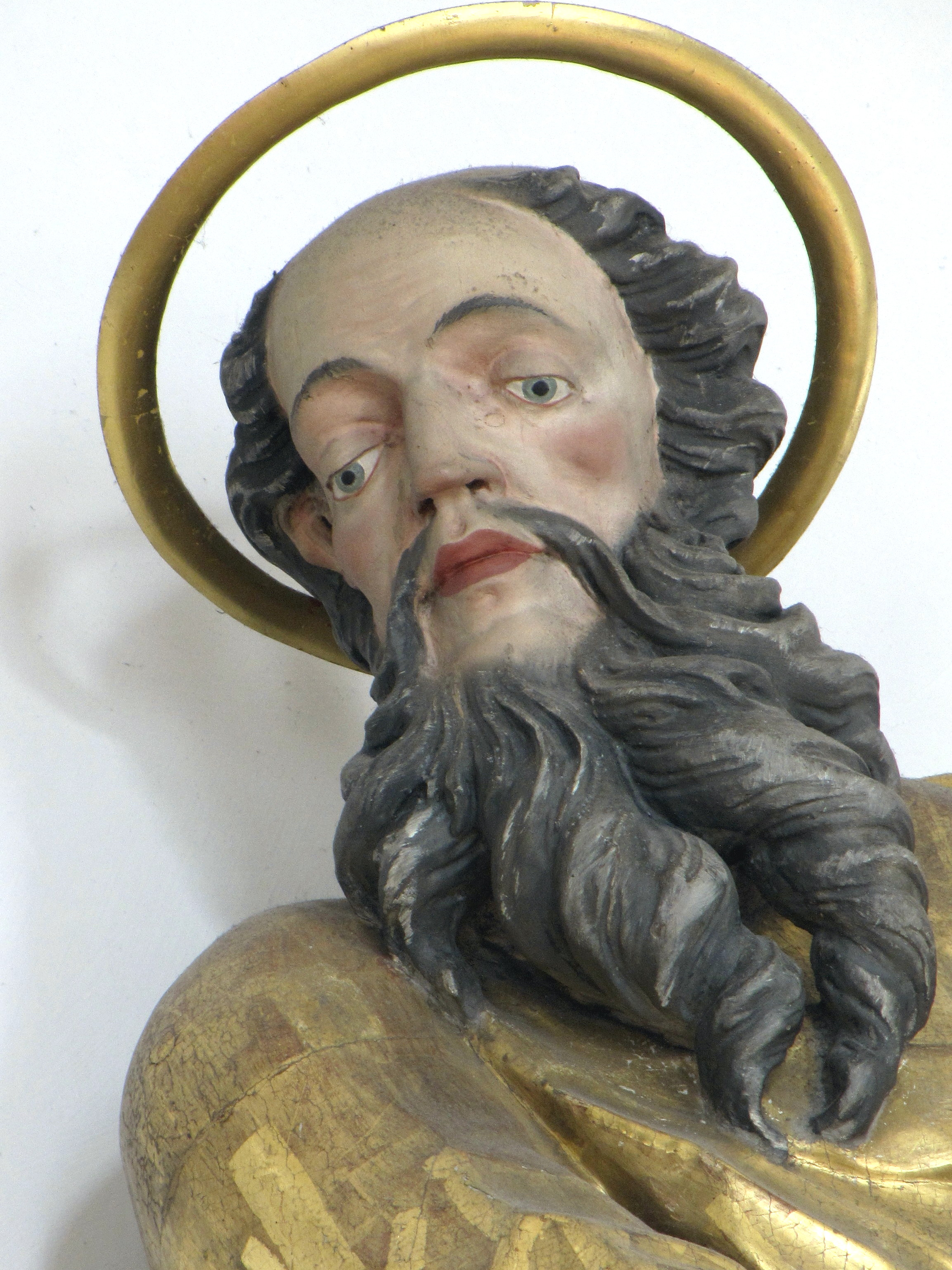 Der Apostel Simon von Melchior Eberhard in der Pfarrkirche in Fischen (Oberallgäu)